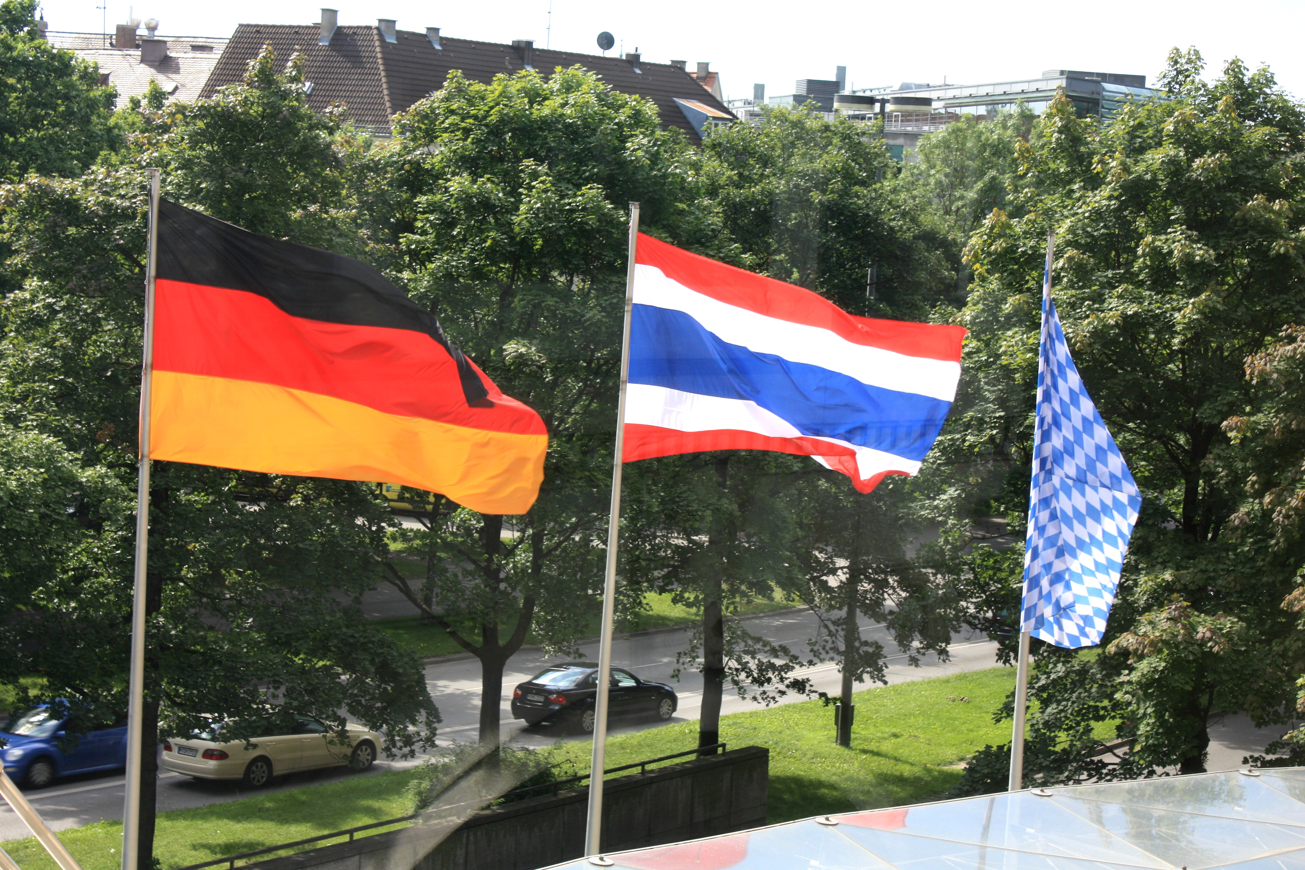 Staatsbesuch von Thailands Premierministerin Yingluck Shinawatra in München. Flaggen von Deutschland, Thailand und Bayern